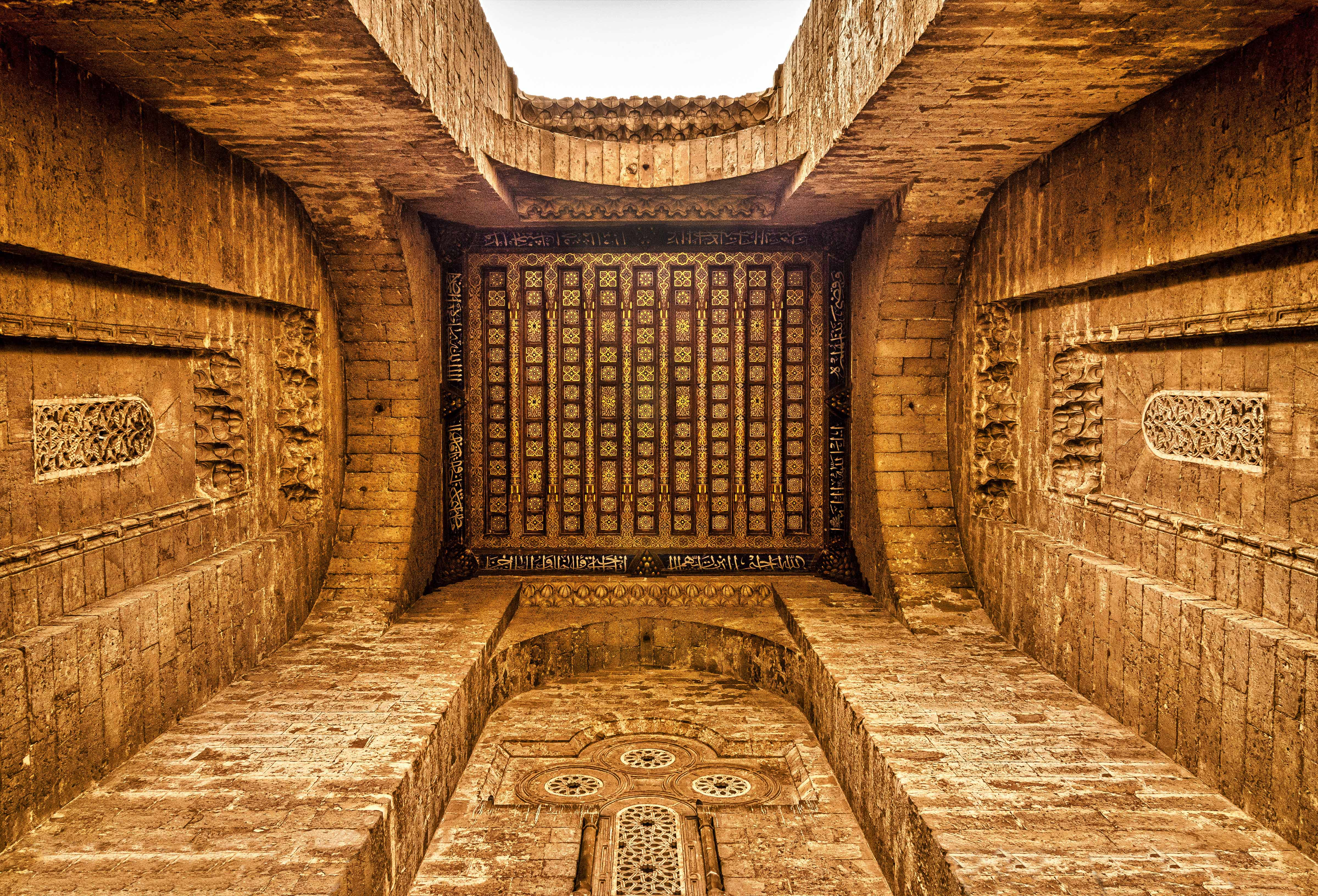 عراقة واصالة مسجد السلطان حسن - مدينة القاهرة